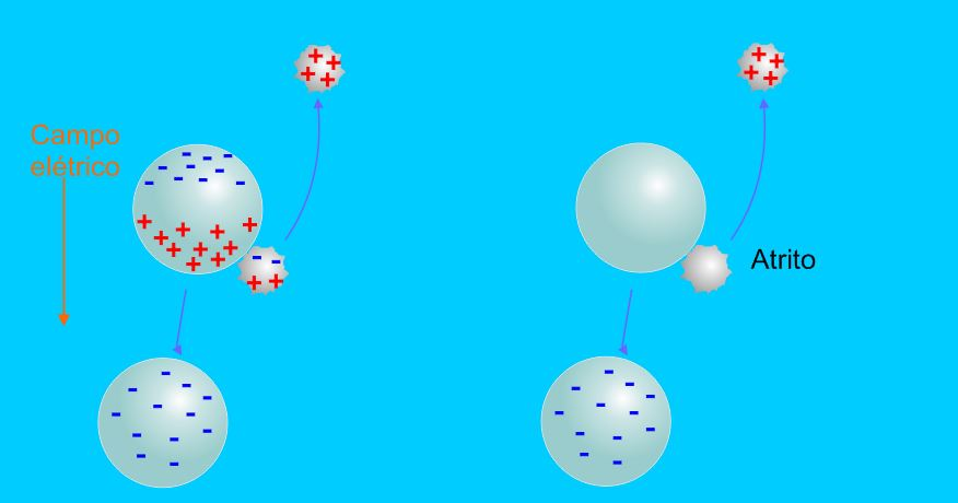 Esquema que mostra o método da eletrização por colisão indutiva (à esquerda), em que as cargas já estão separadas por um campo elétrico externo, e o método por colisões não-indutivo, no qual as cargas surgem a partir das colisões entre as partículas de gelo que possuem propriedades diferentes.